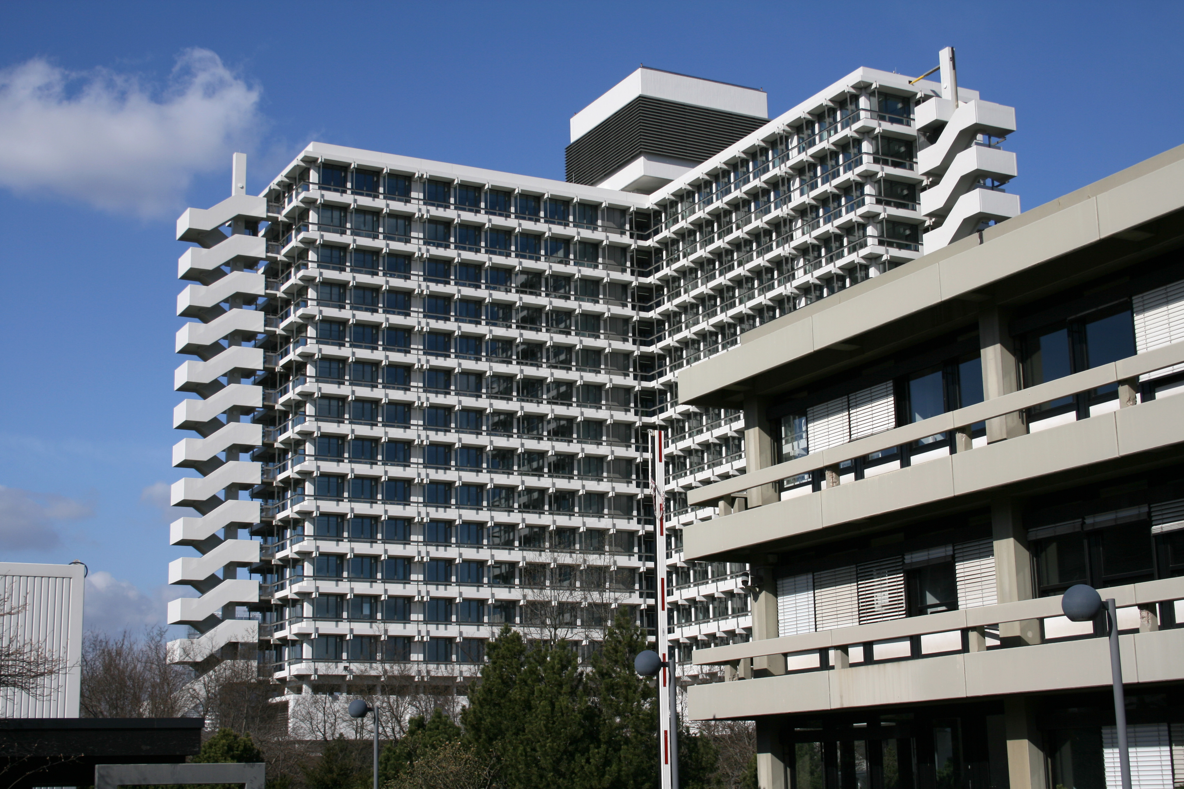 Bundesministerium für Bildung und Forschung in Bonn (Kreuzbauten): im Vordergrund das Streitkräfteamt (Heinemmanstraße 10), im Hintergrund der Turmbau des Bundesministeriums für Bildung und Forschung (Heinemannstraße 2)